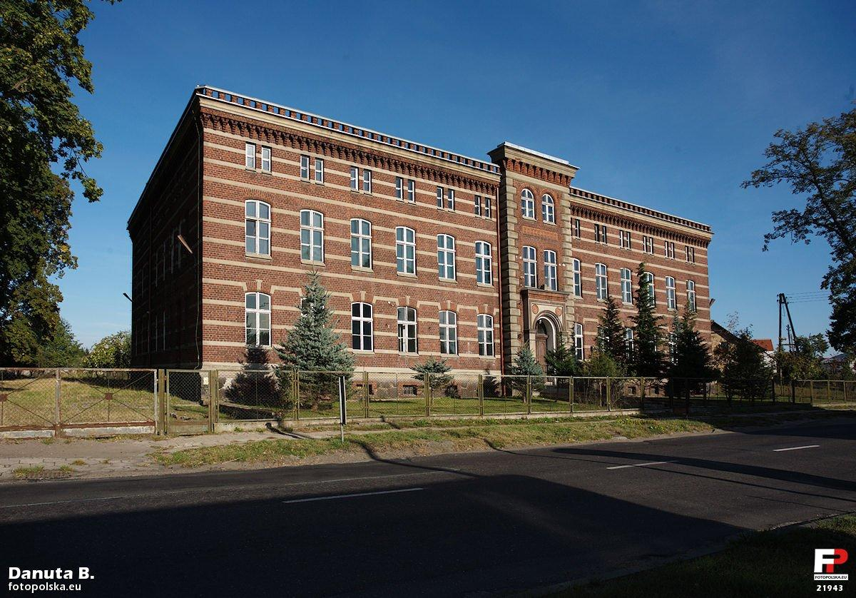 Nieznanego mi przeznaczenia budynek. Wygląda jak szkoła, ale zdjęcia robiłam po rozpoczęciu roku szkolnego, a obiekt był pusty.